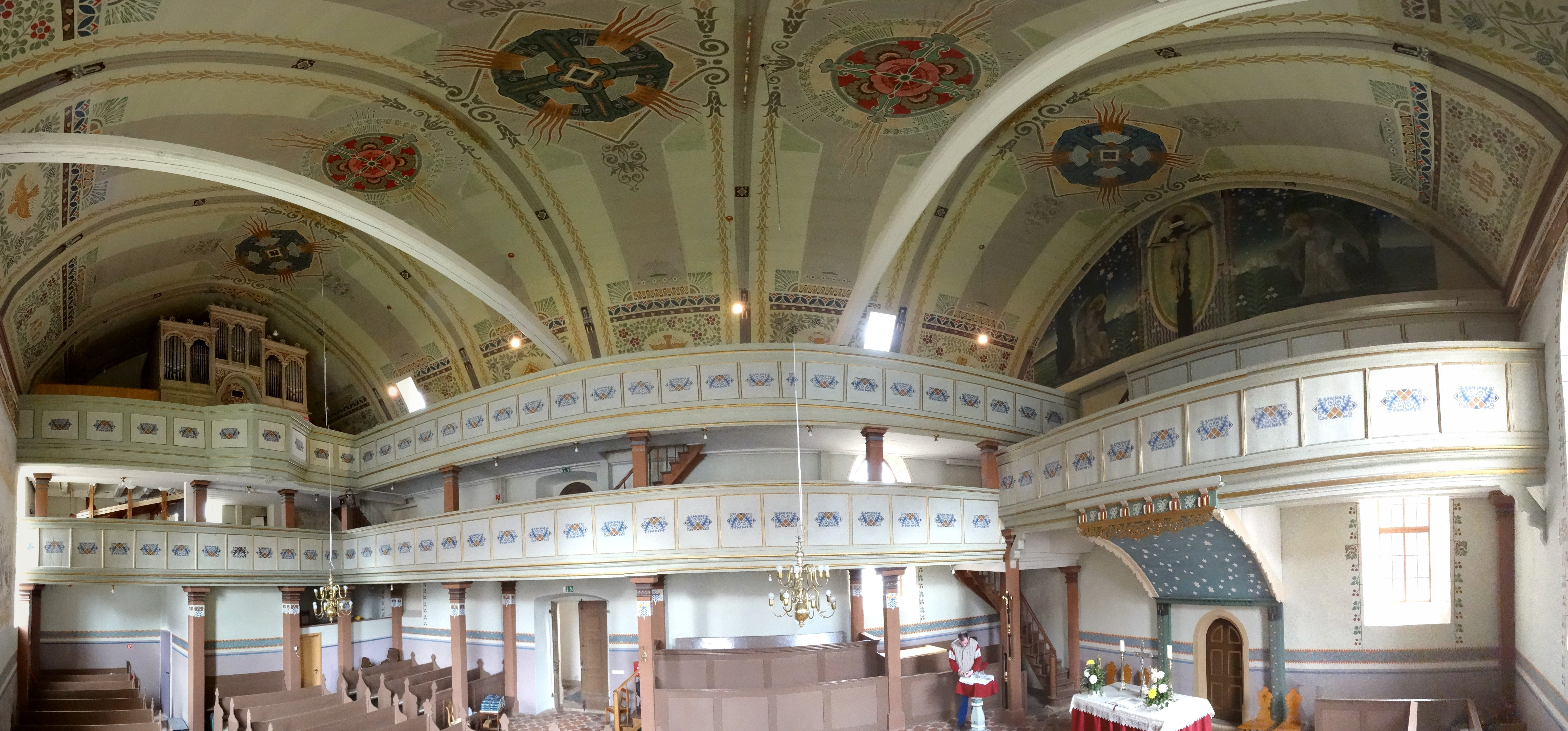 Innenraumpanorama St. Johannes Uelleben